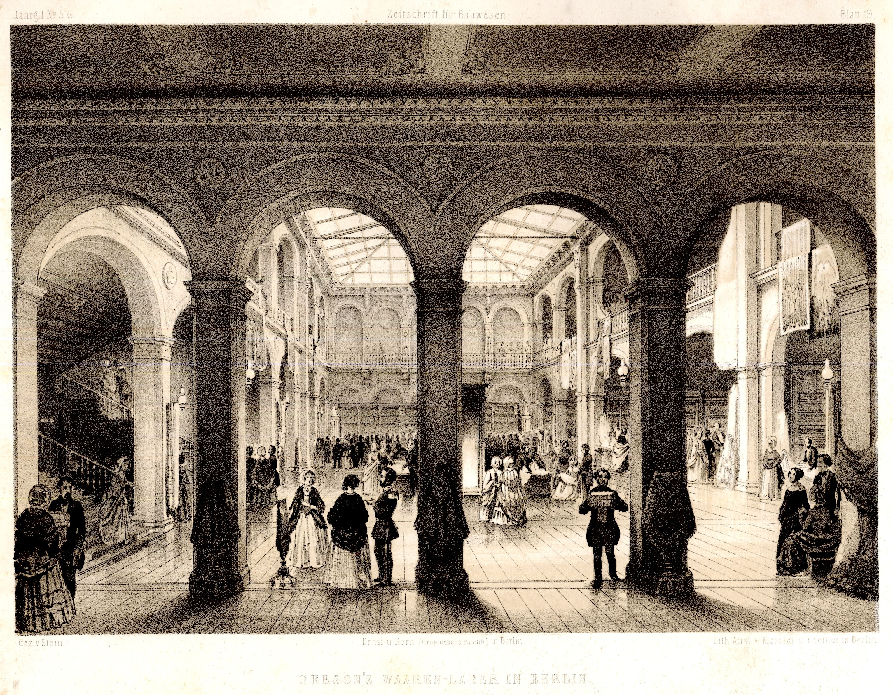 Innenansicht des Kaufhauses Gerson in Berlin 1851